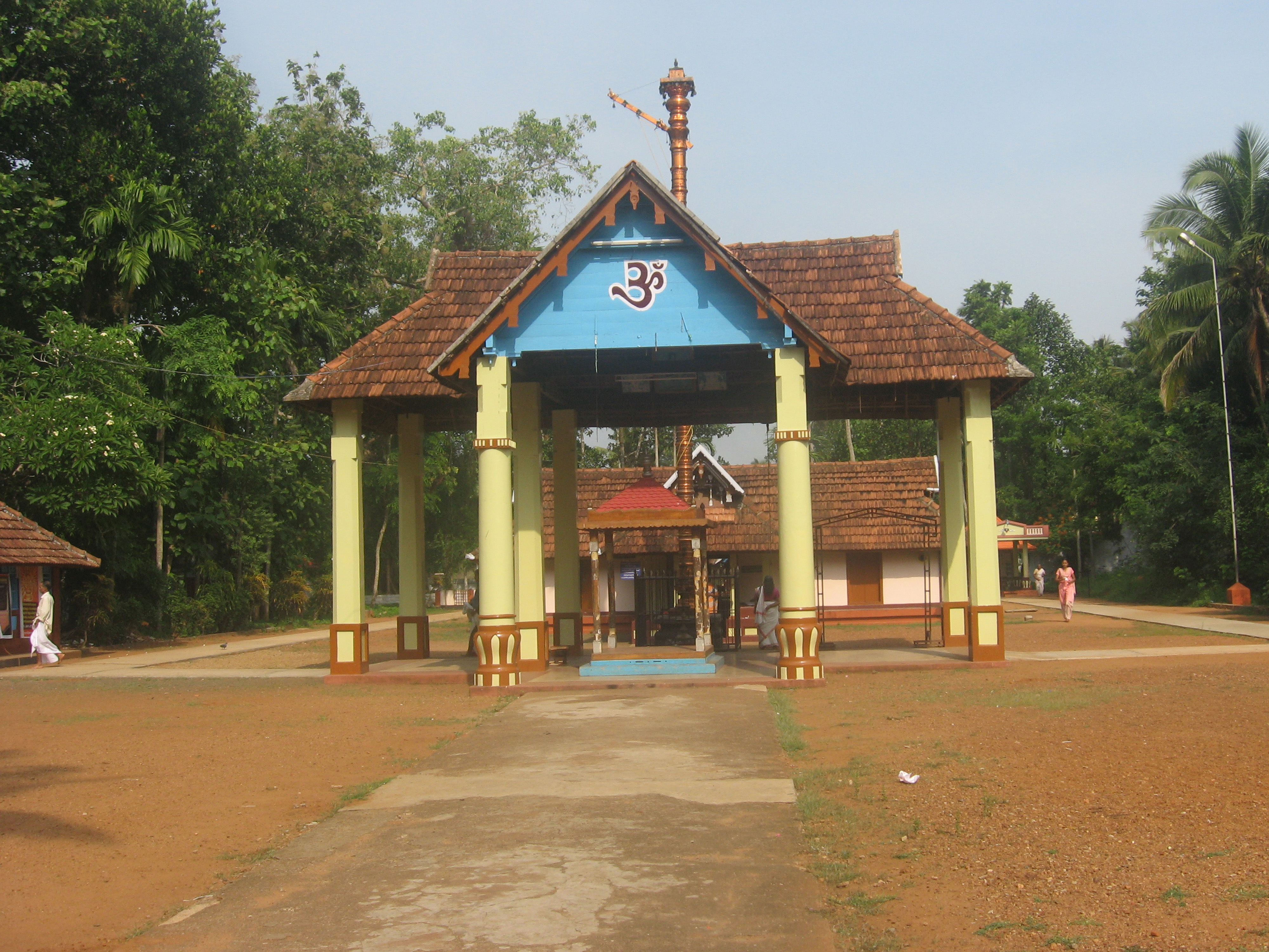 Verur Sri Dharma Shasthra Temple, Changanassery